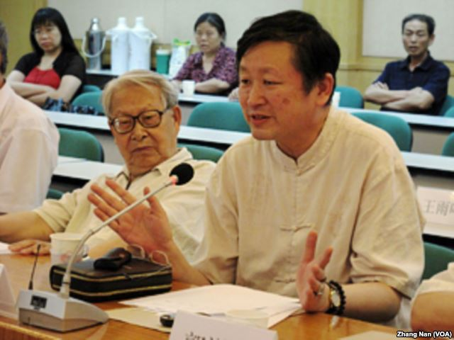 章立凡，中国历史学家。